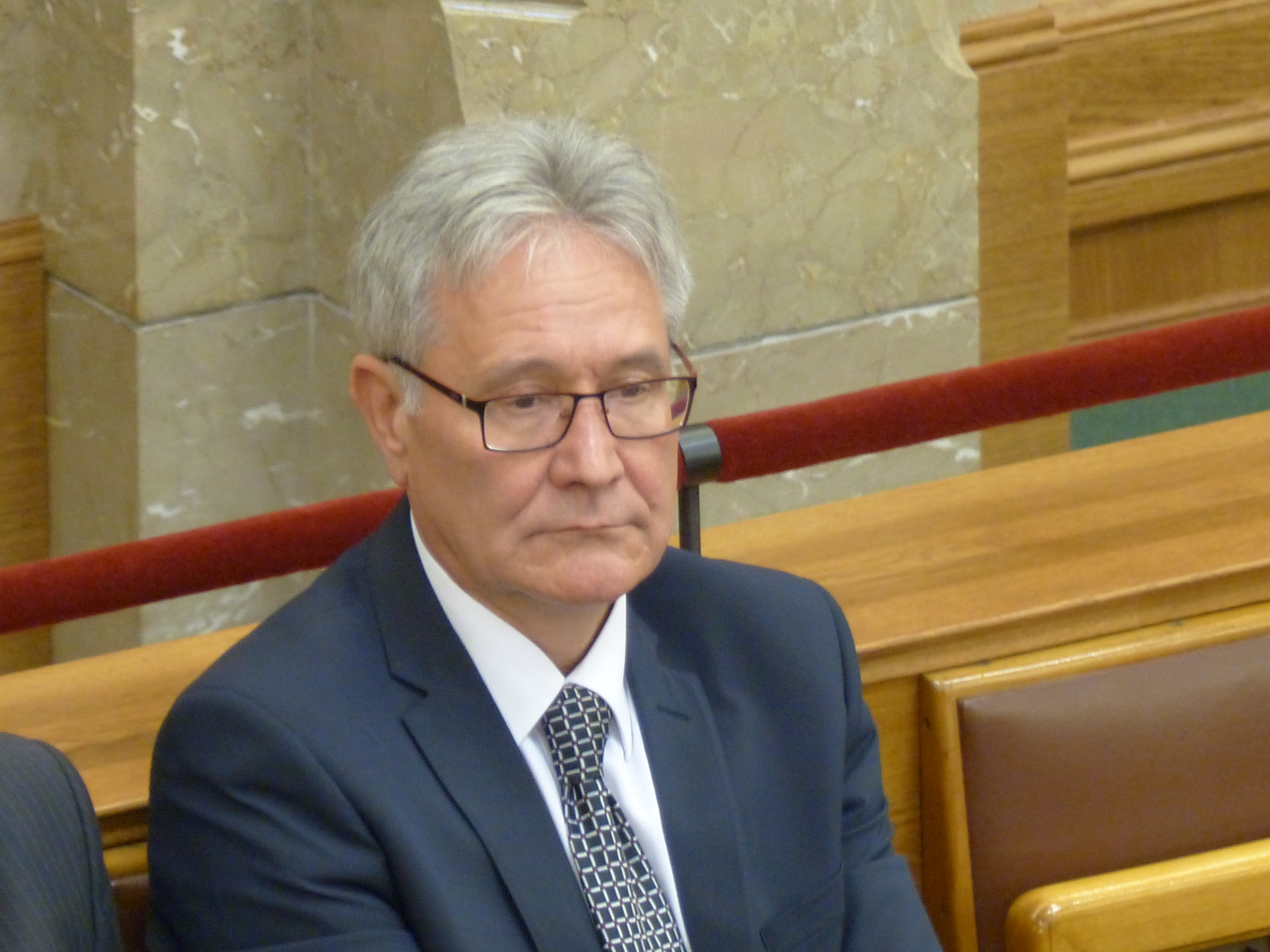 A felvétel 2016. május 2-án, hétfőn készült. Országgyűlés, alsóház, Budapest. A ház megvitatta az úniós források felhasználásának hatékonyságát a 2007 és 2013 közötti időszakban. A mintegy 9223 milliárd forintnyi uniós forrás felhasználása nem Magyarország érdekei szerint történt, az időszakba lehívott 9223 milliárd Forint mintegy 90 százaléka került állami vagy önkormányzati intézményekhez.